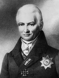 Karl Sigmund Franz Freiherr vom Stein zum Altenstein (1770–1840)label QS:Lde,"Karl Sigmund Franz Freiherr vom Stein zum Altenstein (1770–1840)"